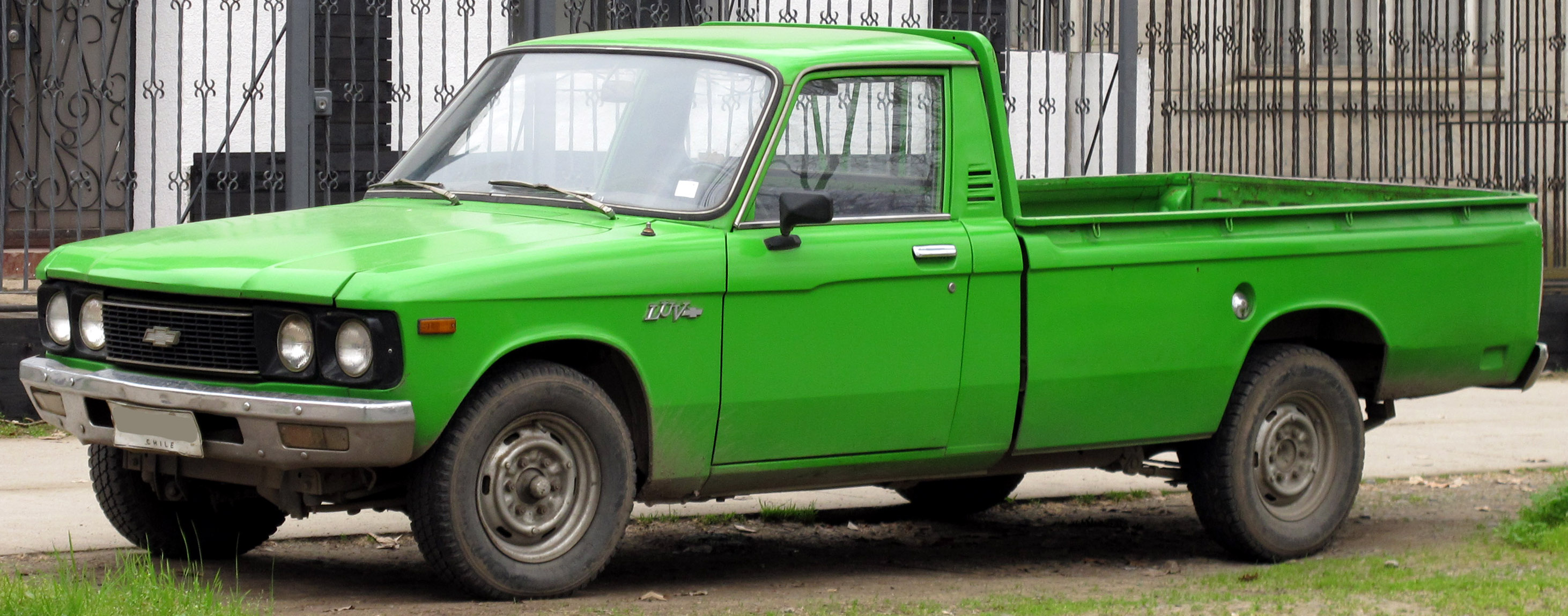 Chevrolet Luv 1600 1978